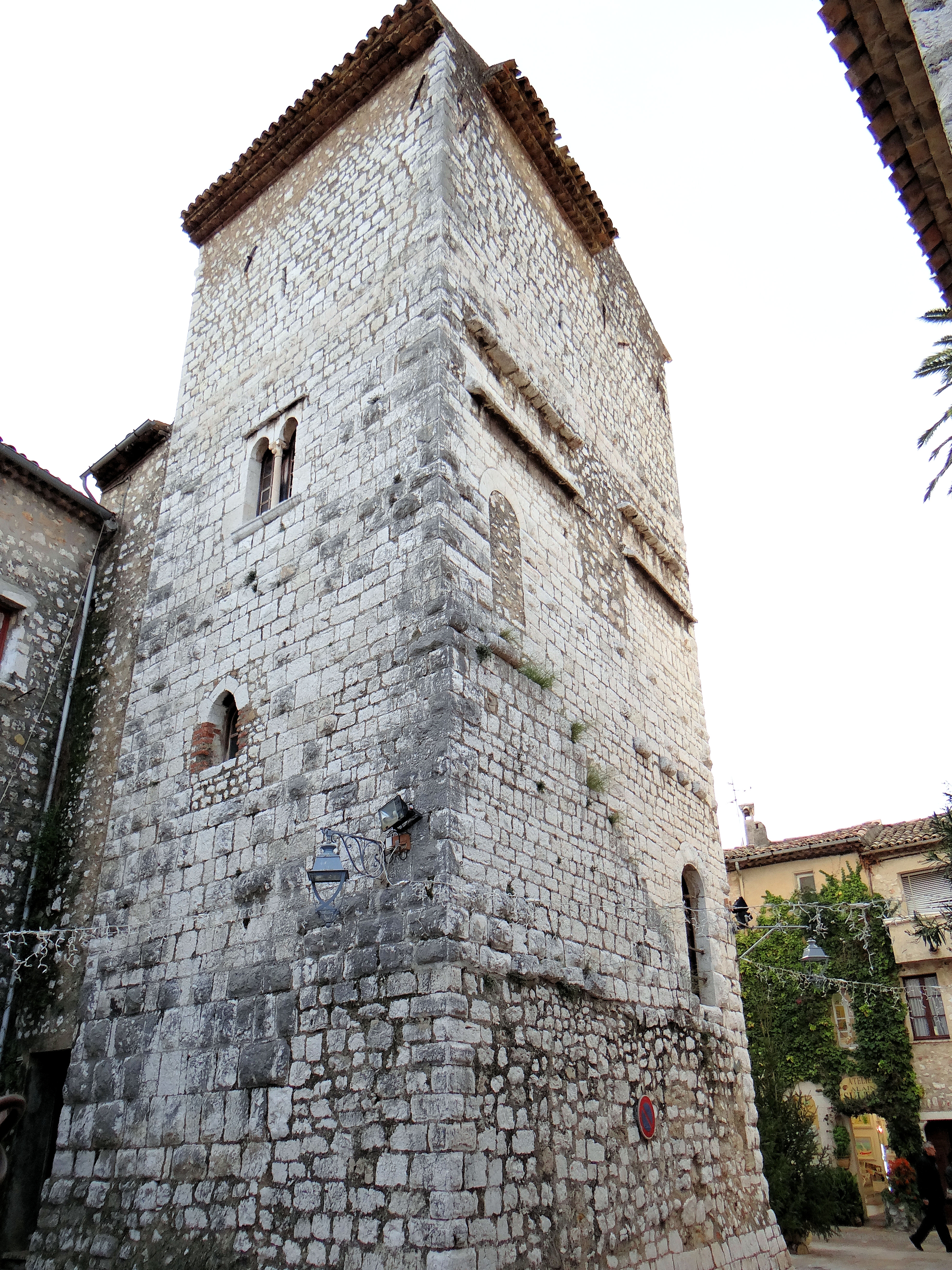 Saint-Paul-de-Vence - Tour de l'ancien château des seigneurs de Saint-Paul - Faces est et nord